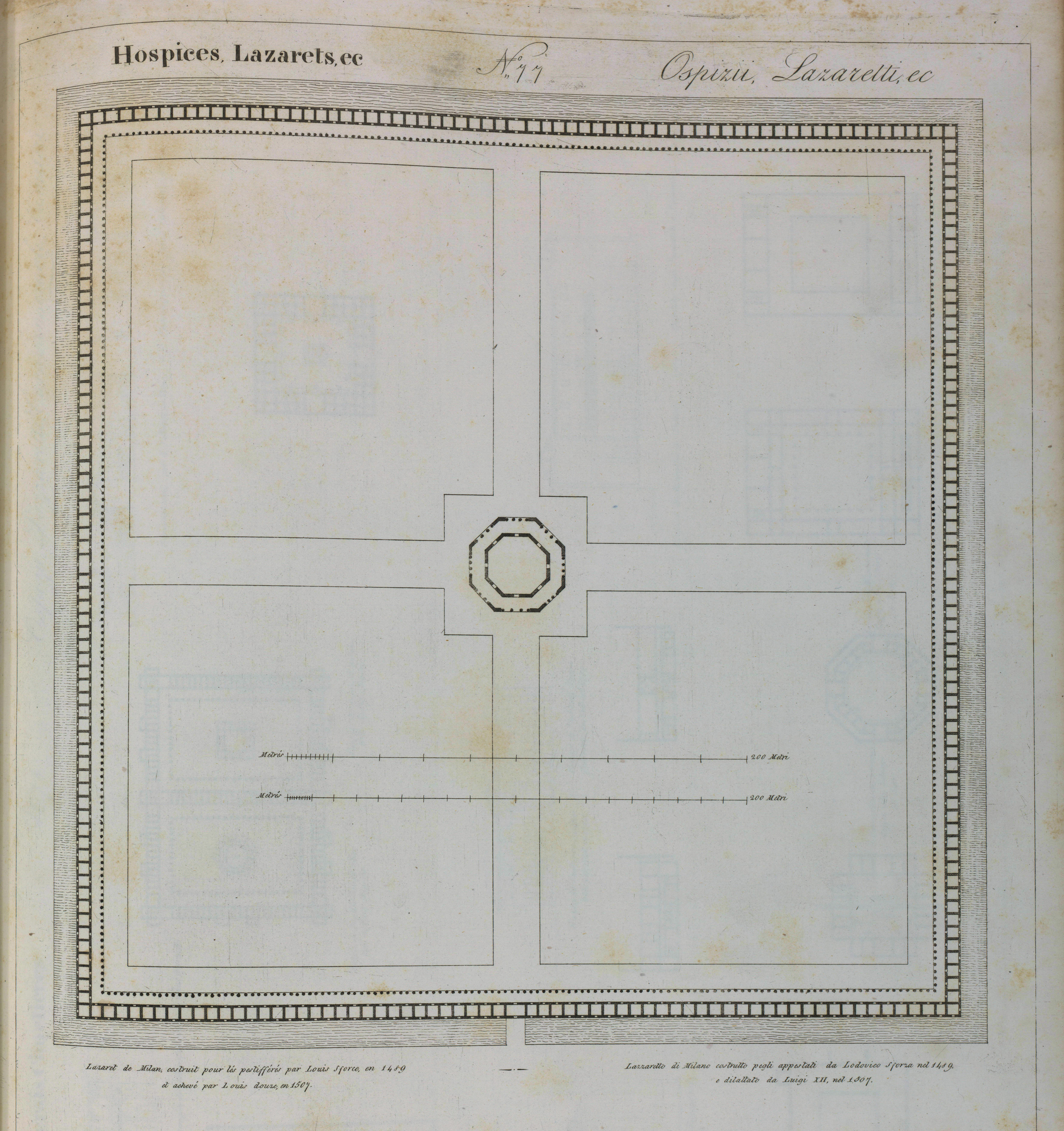 Lazzaretto di Milano costrutto pegli appestati da Lodovico Sforza nel 1489 e dilattato da Luigi XII nel 1507.